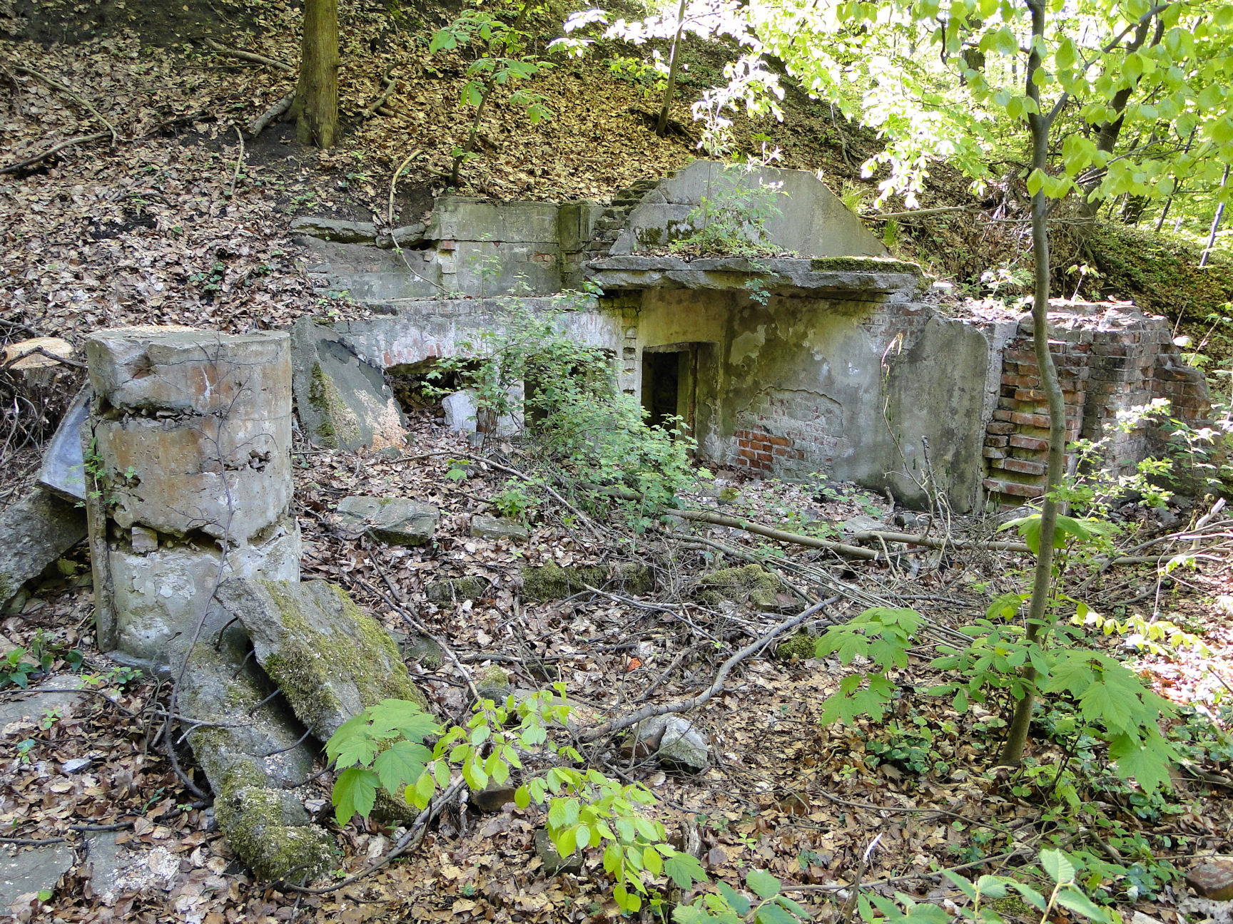 Ruiny pałacu Toepffera przy ul. Grabowej w Szczecinie Zdrojach